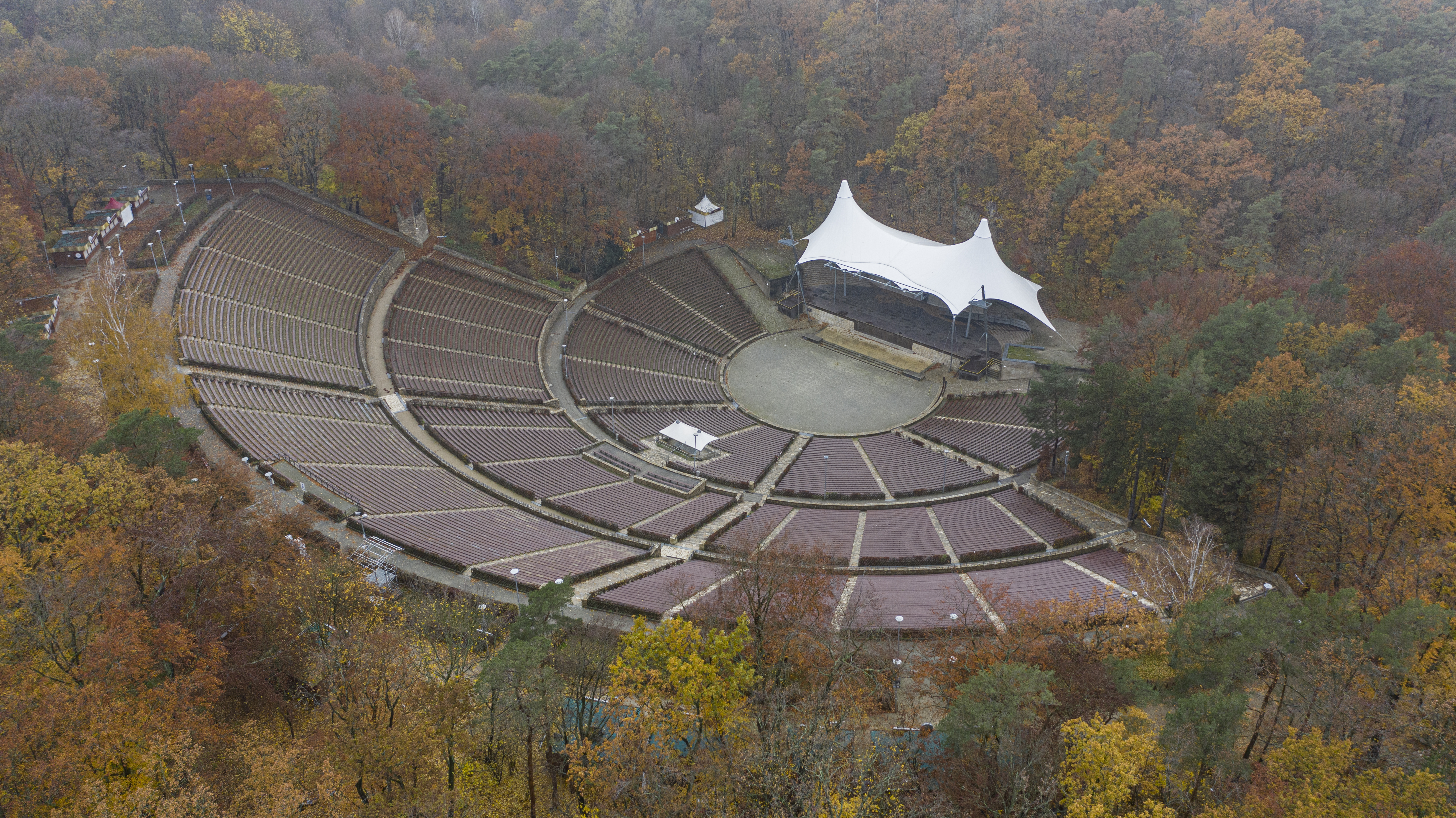 Berliner Waldbühne